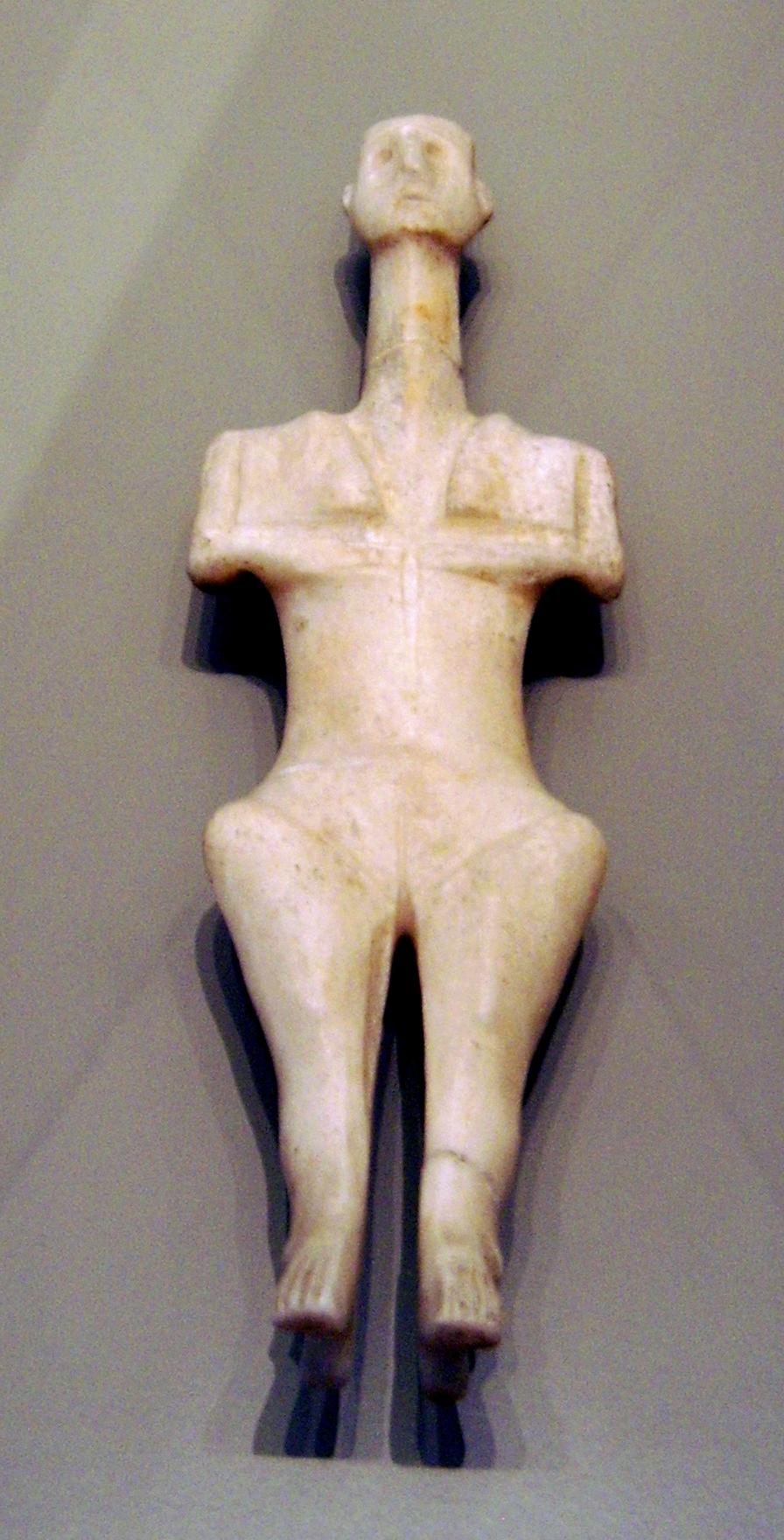 Weibliches Marmoridol der Kykladenkultur, Plastiras-Typ, 3000/2700 v. Chr., angeblich in einem Grab auf Delos gefunden, Altes Museum: Antikensammlung Berlin